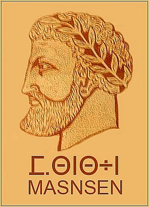 Portrait du roi amazigh Massinissa, fondateur du royaume de Numidie